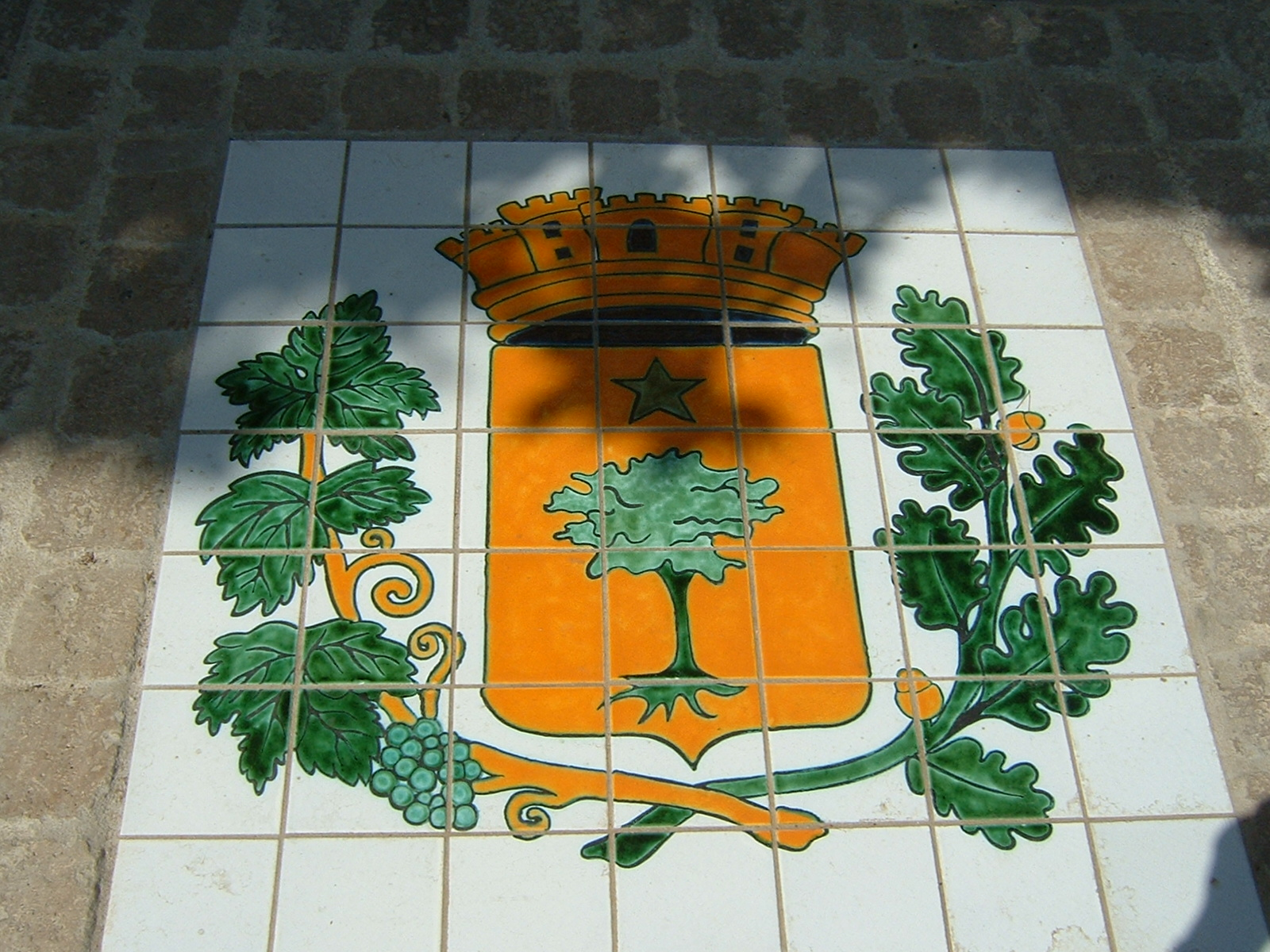 Blason de la ville de Ramatuelle (83, Var)